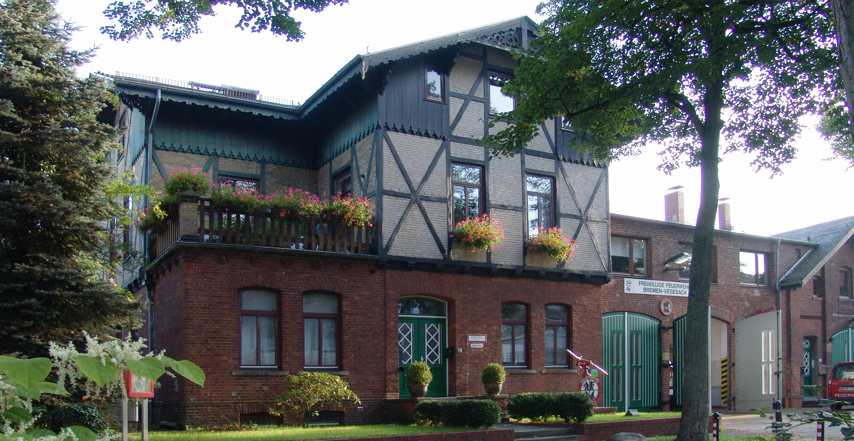 Villa Fritze, Remise in Bremen, Weserstraße 33.Das abgebildete Objekt ist ein geschütztes Kulturdenkmal in der Freien Hansestadt Bremen, mit der Nr. 1859 beim Landesamt für Denkmalpflege registriert.